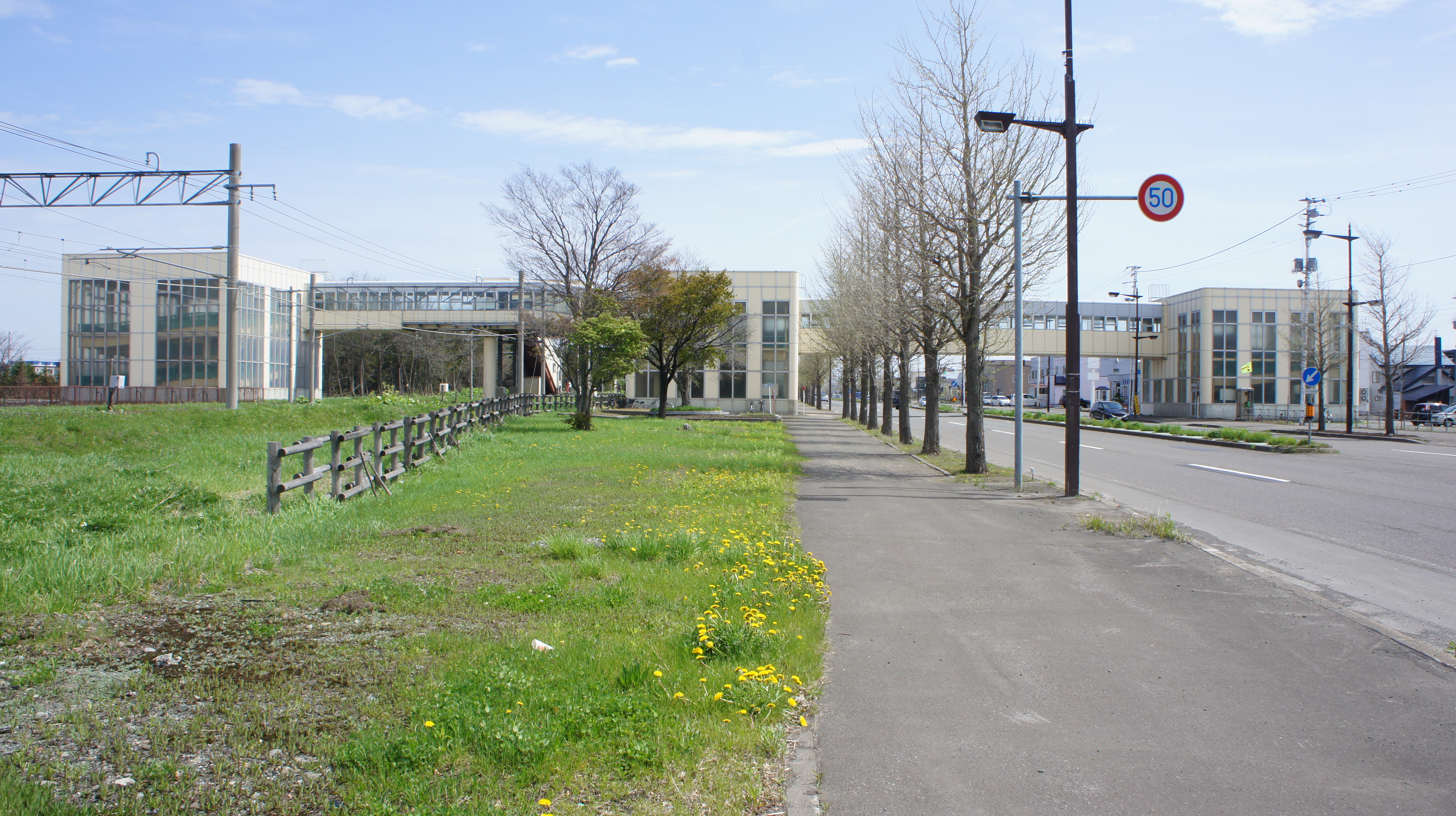 JR函館本線・上幌向駅の駅舎（全体） Sony NEX-3